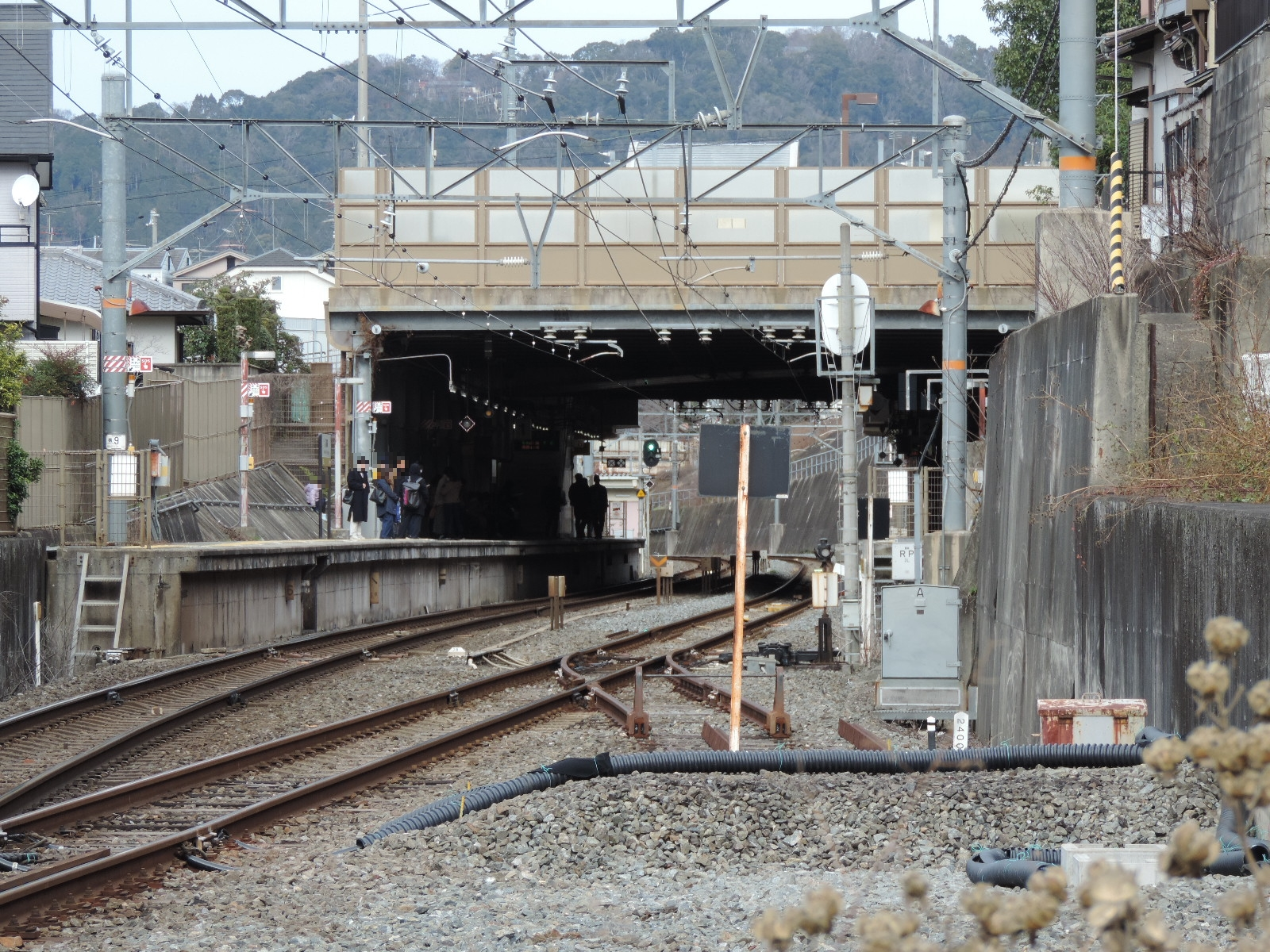 JR藤森駅を木津方の踏切外より（撮影：2020年1月）